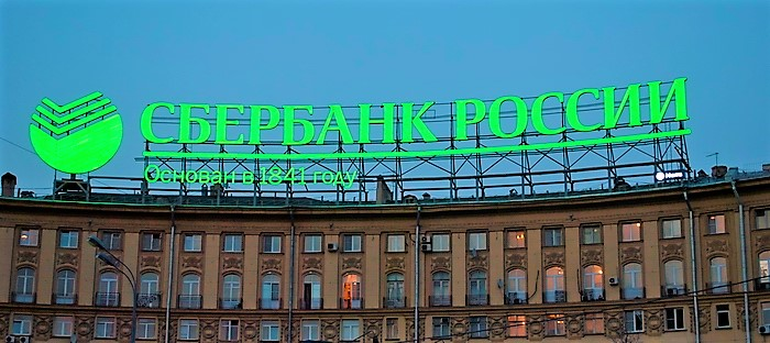 2011, апрель, Москва